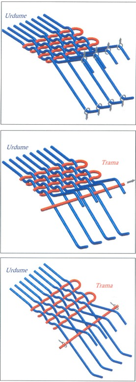 Exemplo de inserção de trama na formação de tecido. Imagem feita por mim.